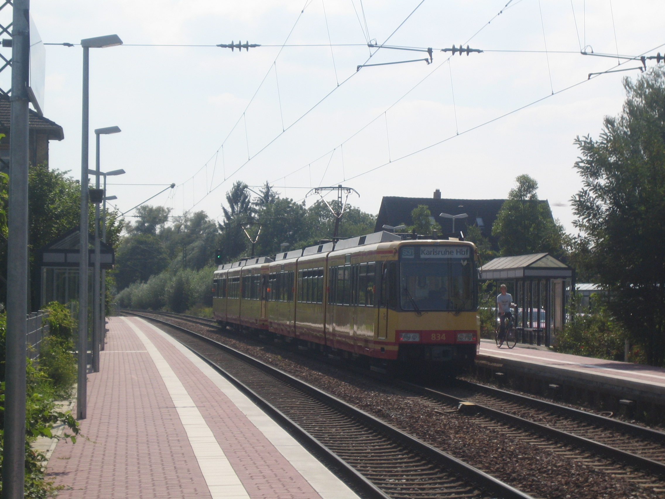 Karlsruher Stadtbahn im Bahnhof Untergrombach